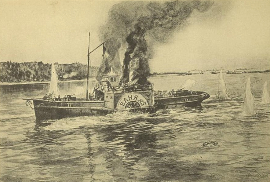 Канонерская лодка Волжской военной флотилии «Ваня». Репродукция работы И. А. Владимирова «Бой под Пьяным Бором (на реке Каме)»